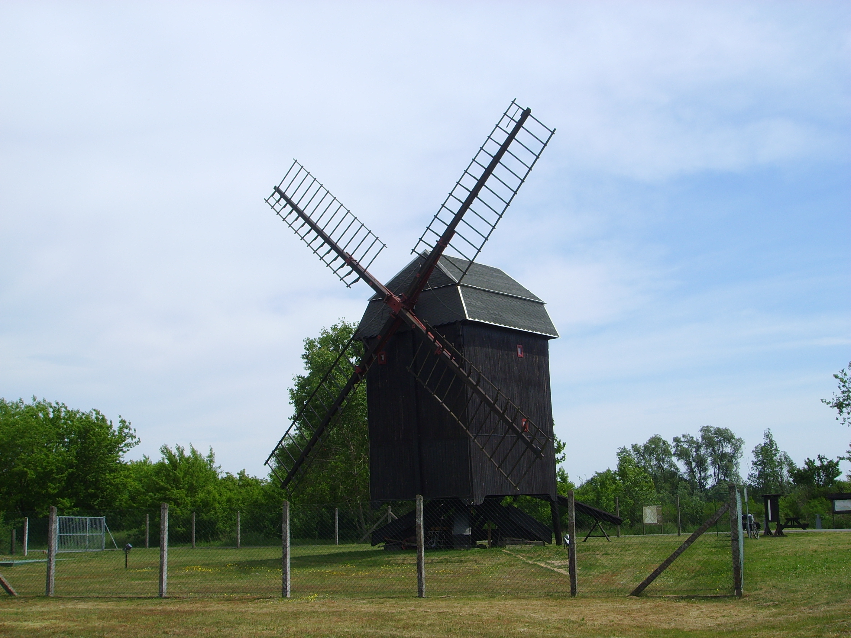 Denkmalgeschützte Windmühle in Elster (Elbe)